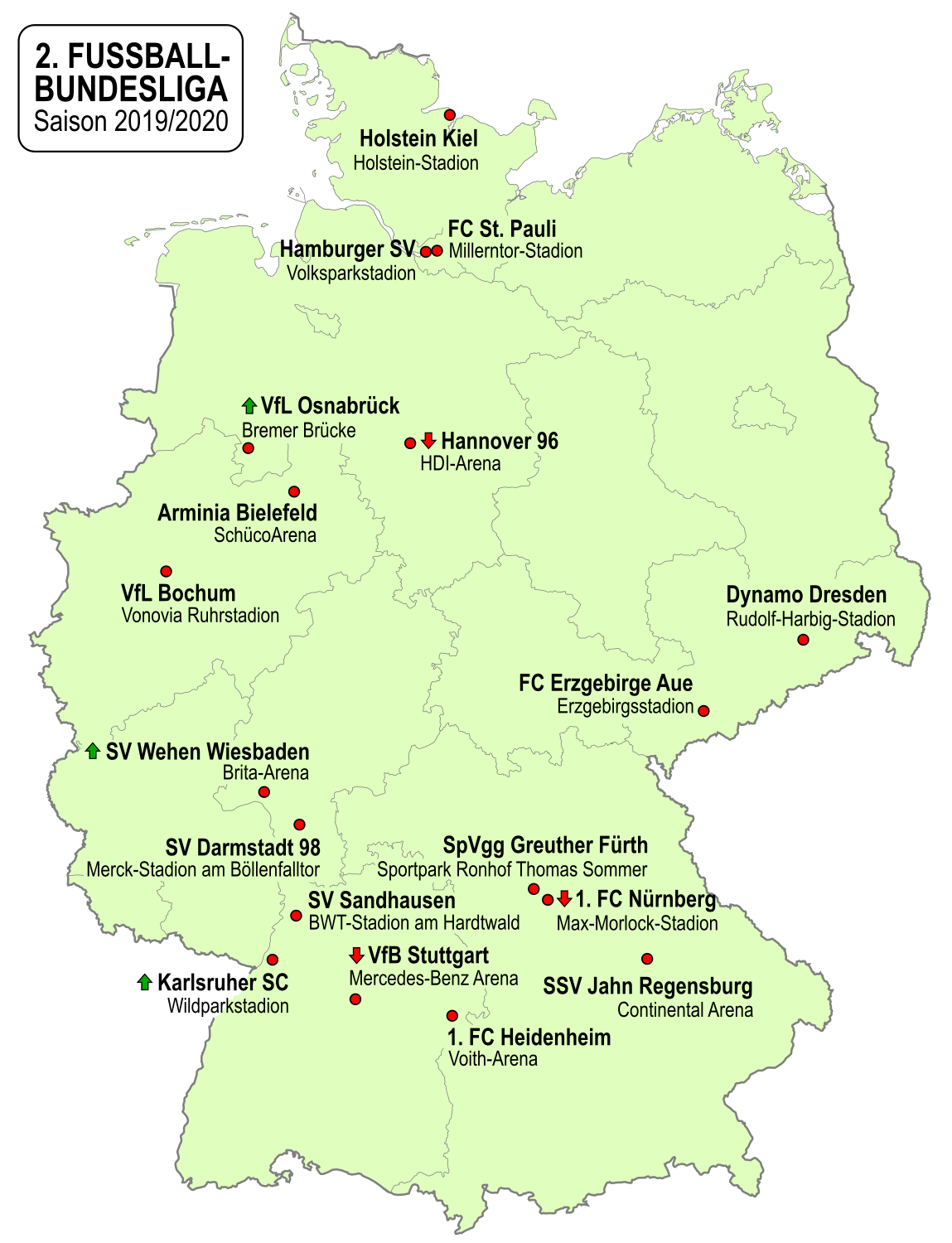 Karte der Vereine der 2. Fußball-Bundesliga-Saison 2019/2020